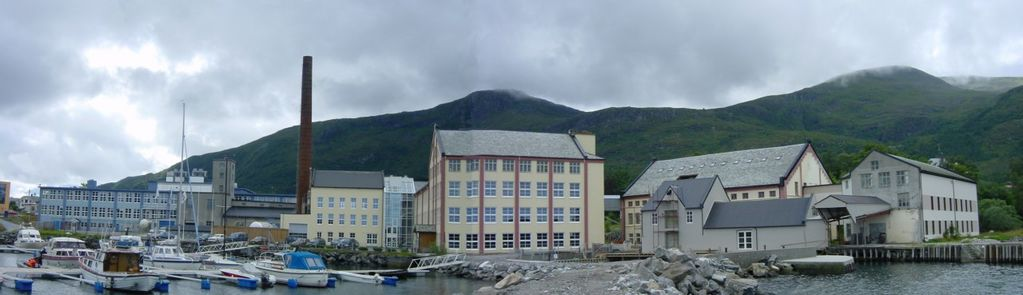 O.A. Devolds Sønner AS, Langevåg, Møre og Romsdal Norway Panoramic edit of several pictures